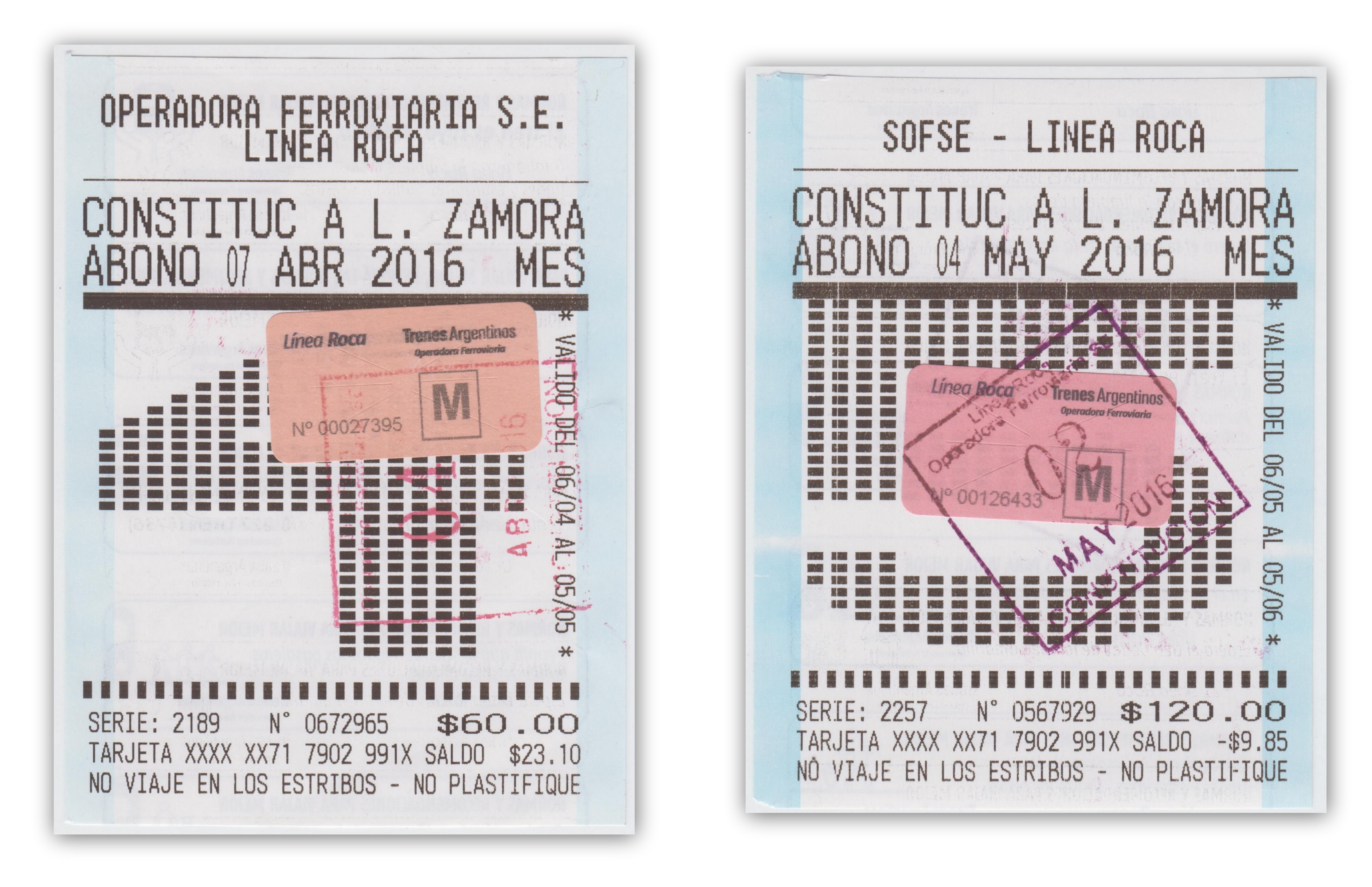 Contraposición de los abonos mensuales para el Ferrocarril General Roca de Buenos Aires correspondientes a los meses de abril y mayo de 2016, donde se exhibe el incremento del 100% que experimentó la tarifa de un mes al otro.